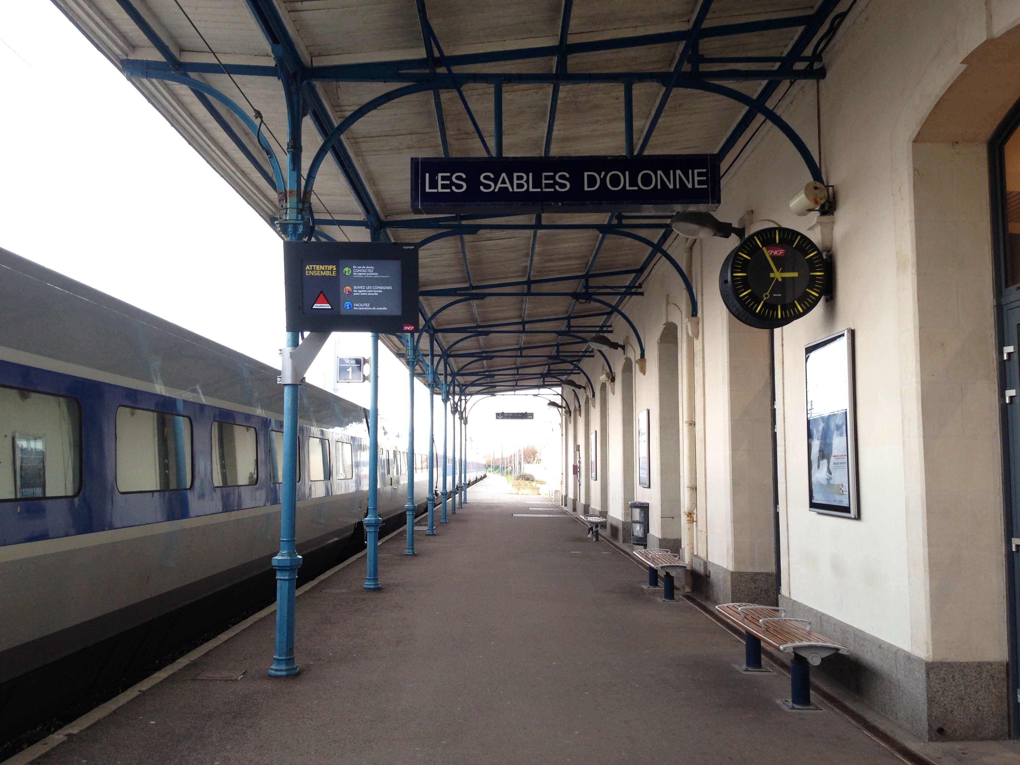 Gare des Sables-d'Olonne